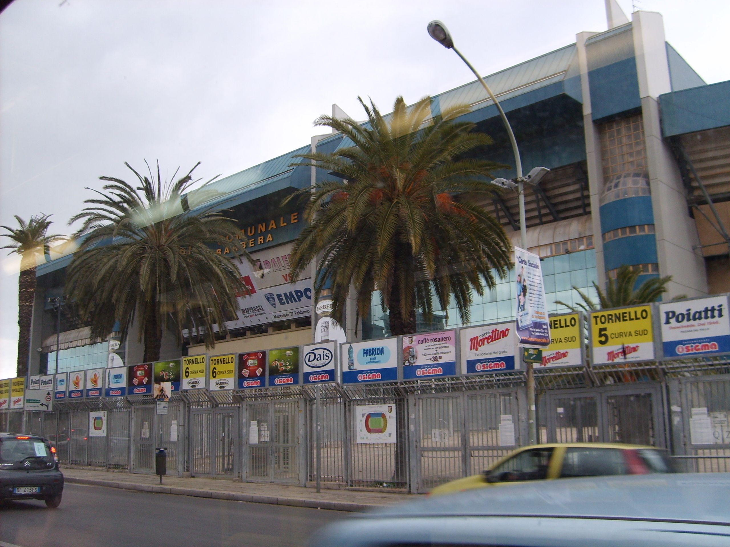 stadio di calcio di Palermo (stadio comunale Renzo Barbera)